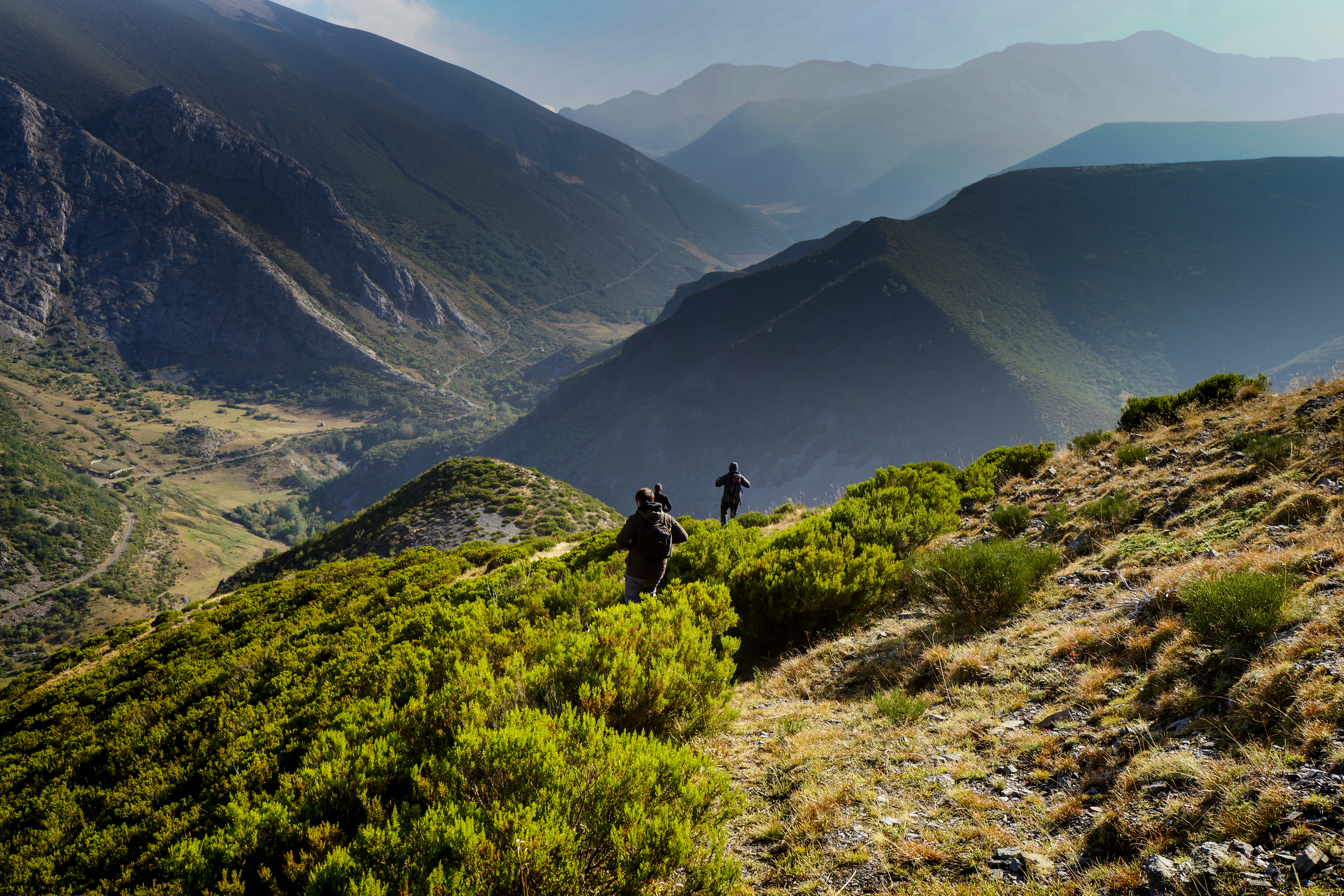 This is a photography of a Site of Community Importance in Spain with the ID: ES0000003. Natura2000 entry, EEA entry